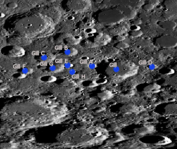 Cráter lunar Gill. Cráteres satélite. (Imagen LRO)